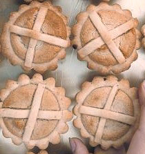 Leipziger Lerchen - specialty of Leipzig, Germany.